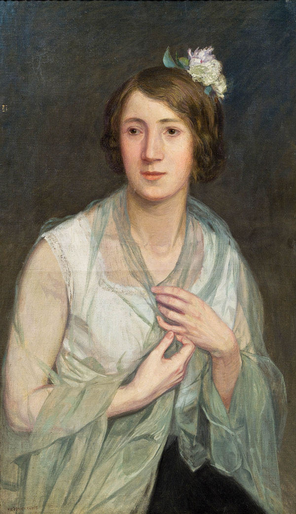 Bildnis einer eleganten Dame.